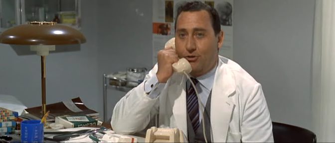 Schermata del file Il medico della mutua